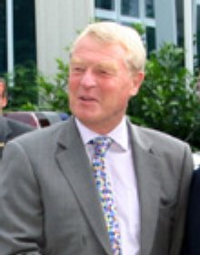 Paddy Ashdown